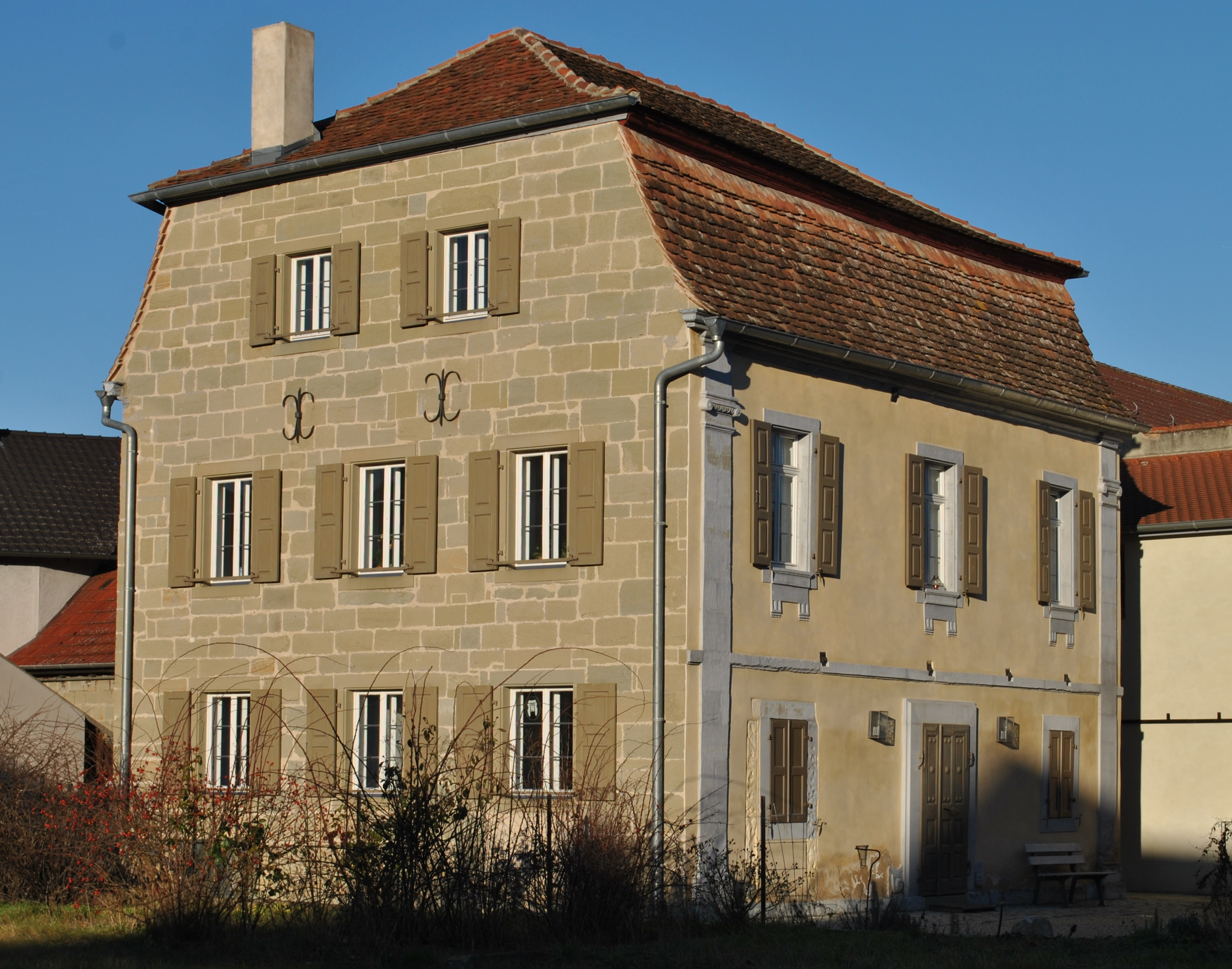 Ehemalige Synagoge Zweigeschossiger Mansardhalbwalmdachbau, 1792/93 D-6-75-177-23